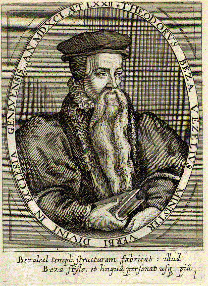 Théodore de Bèze (1519-1605) in 1596